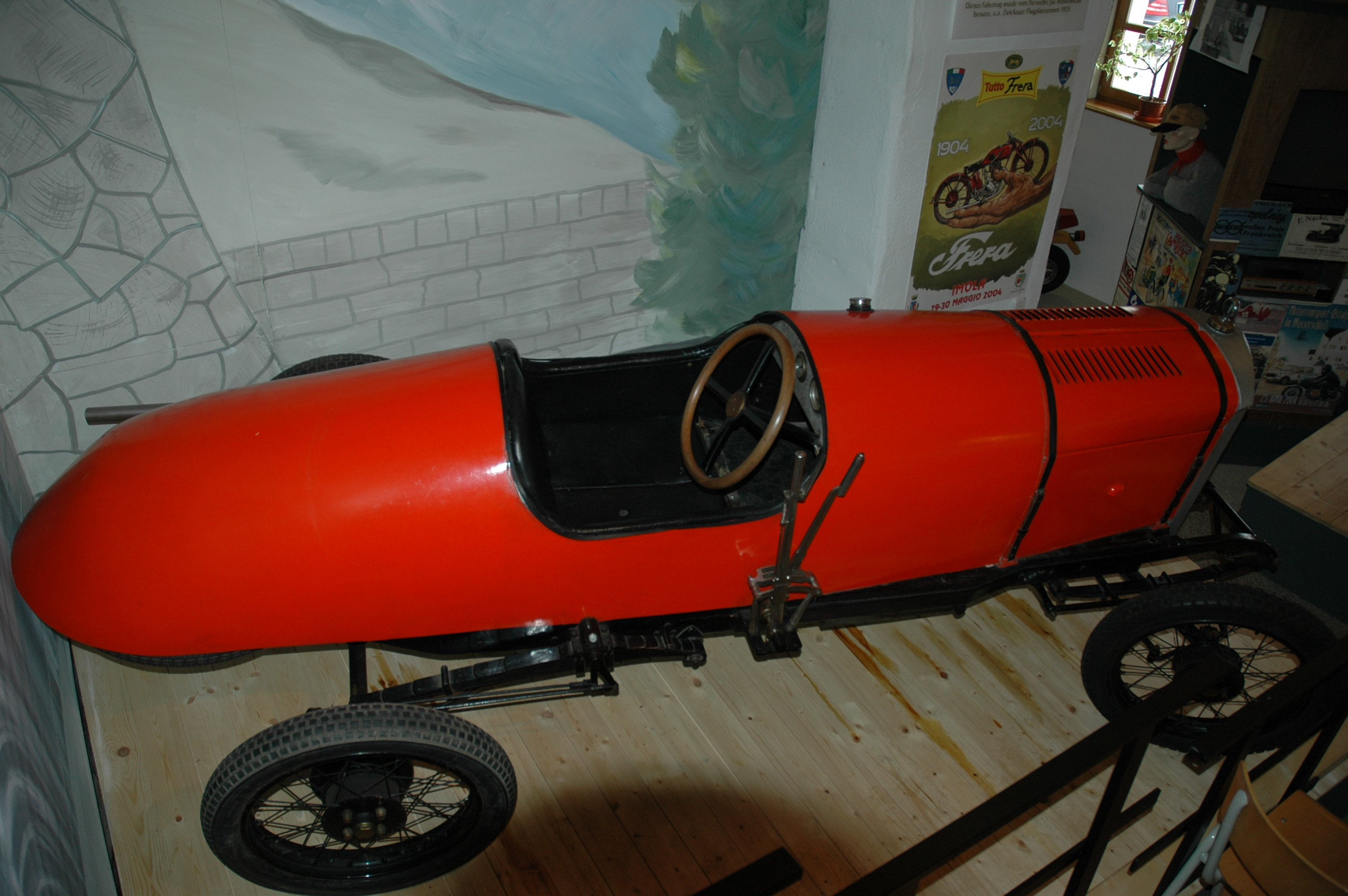 Hataz Museum